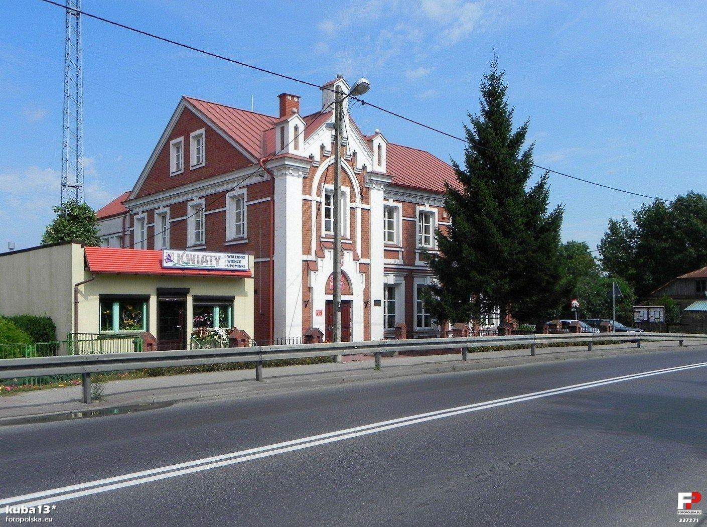 Urząd Gminy w Kurowie przy ulicy Lubelskiej 35.